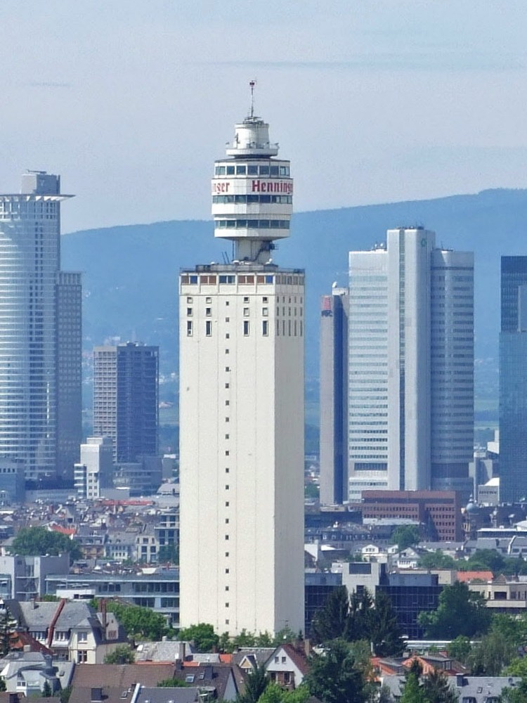 Henninger Turm und skyline von Frankfurt aus Sueden